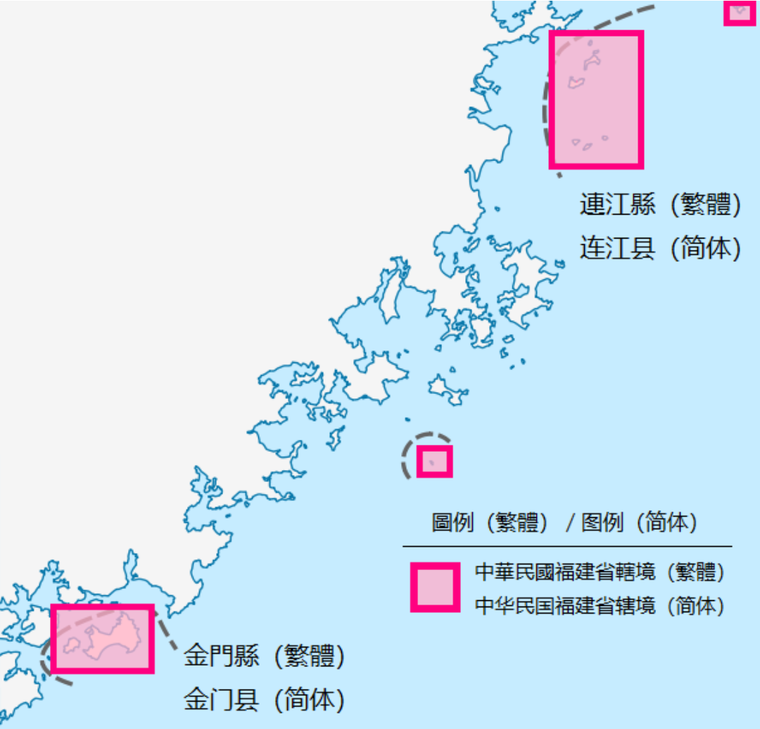 中文（香港）: 中華民國福建省轄境。